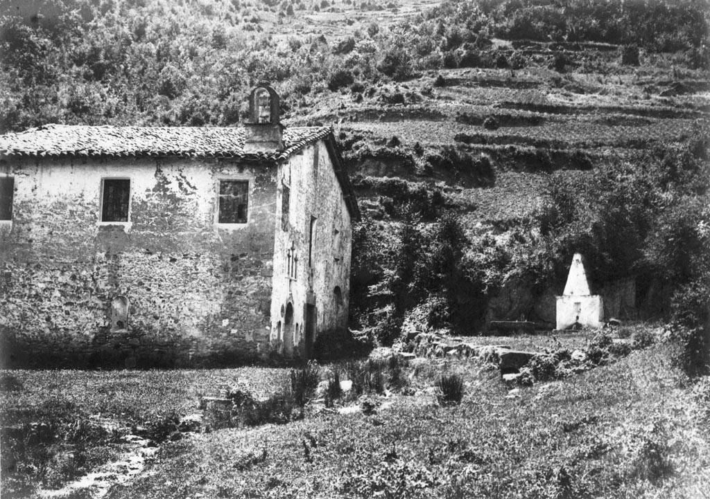 Font de Joan i part d'una masia de Ridaura. Cèsar August Torras i Ferreri (Entre 1890 i 1923)